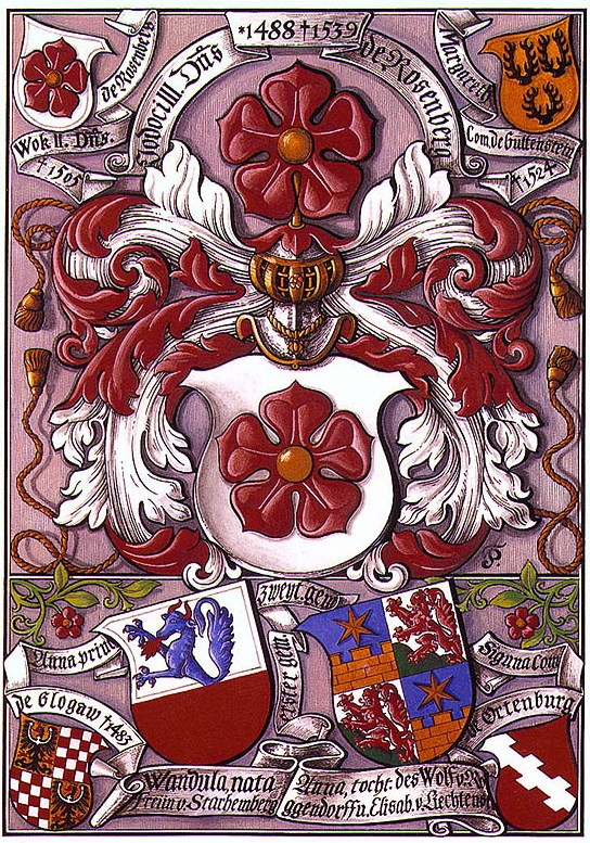 Znak Jošta III. z Rožmberka